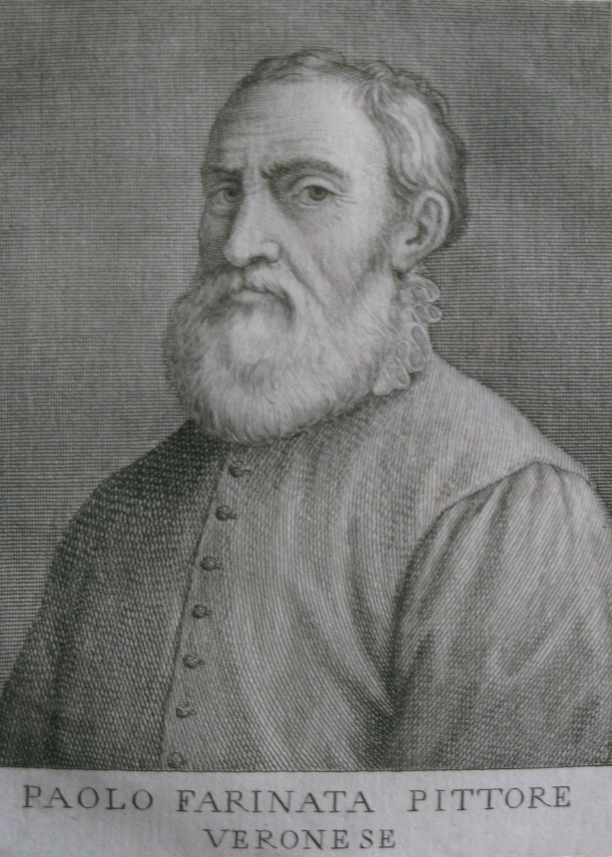 Il pittore veronese Paolo Farinati